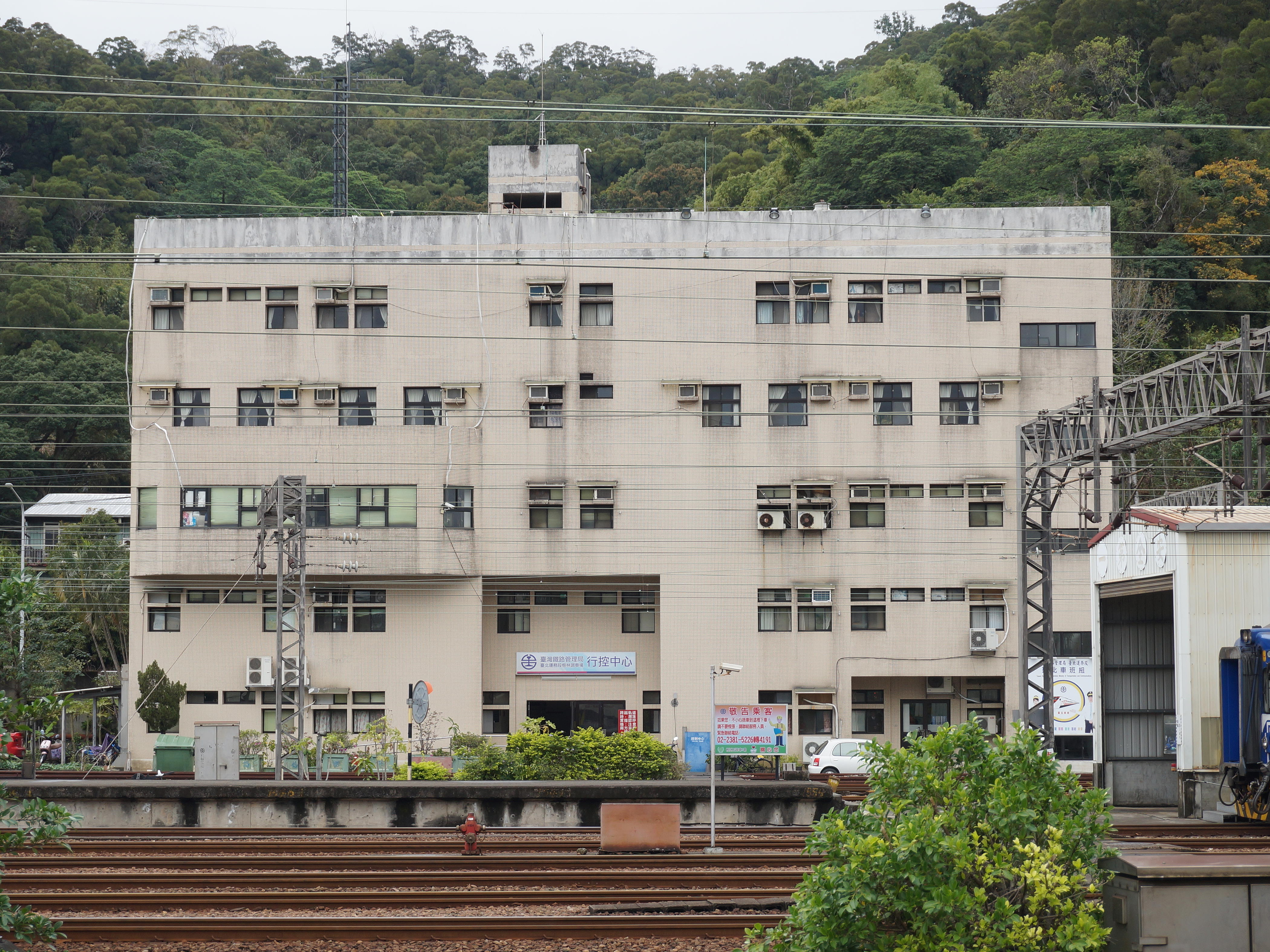 臺灣鐵路管理局樹林調車場行控中心。